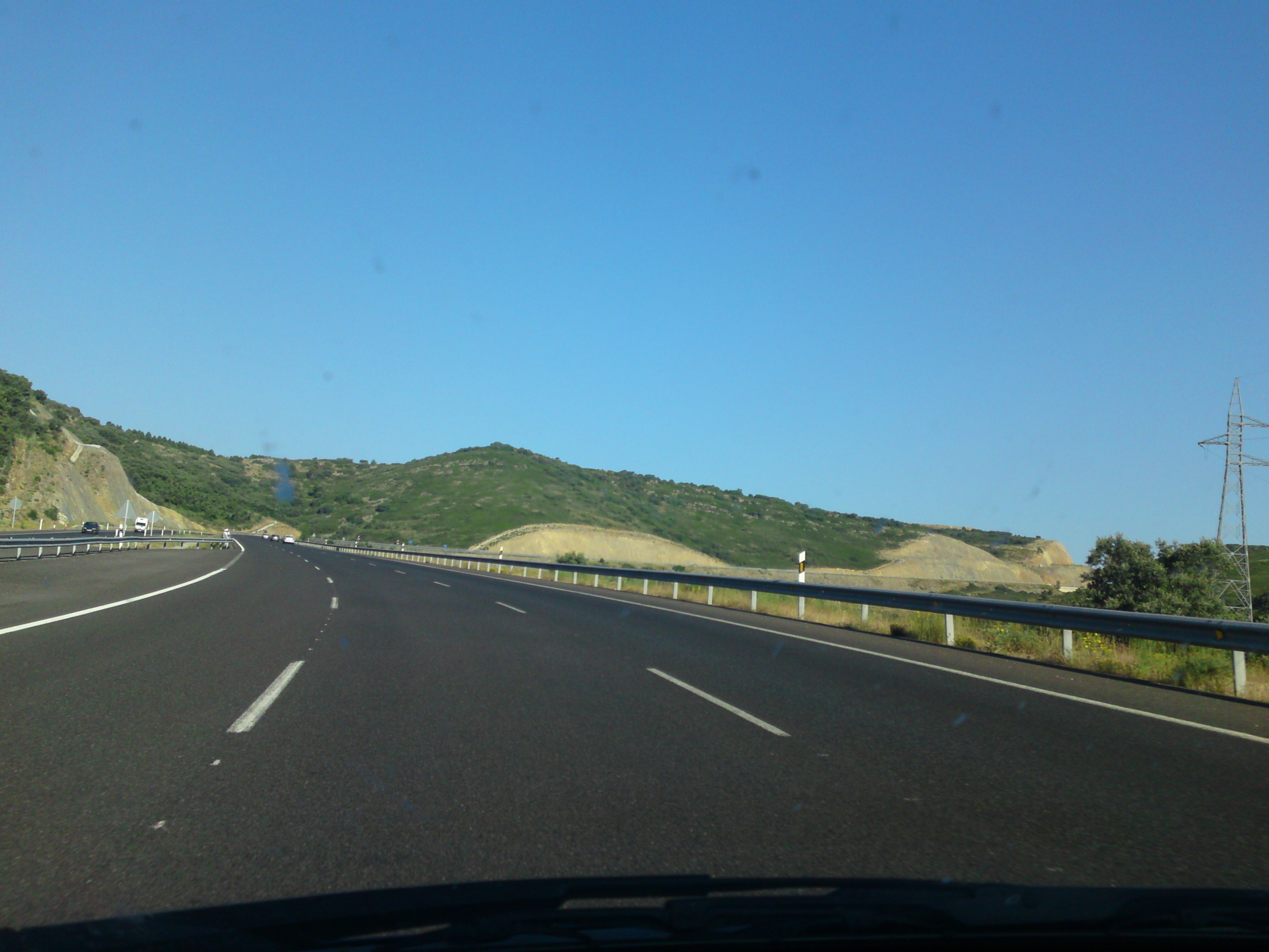 barracas